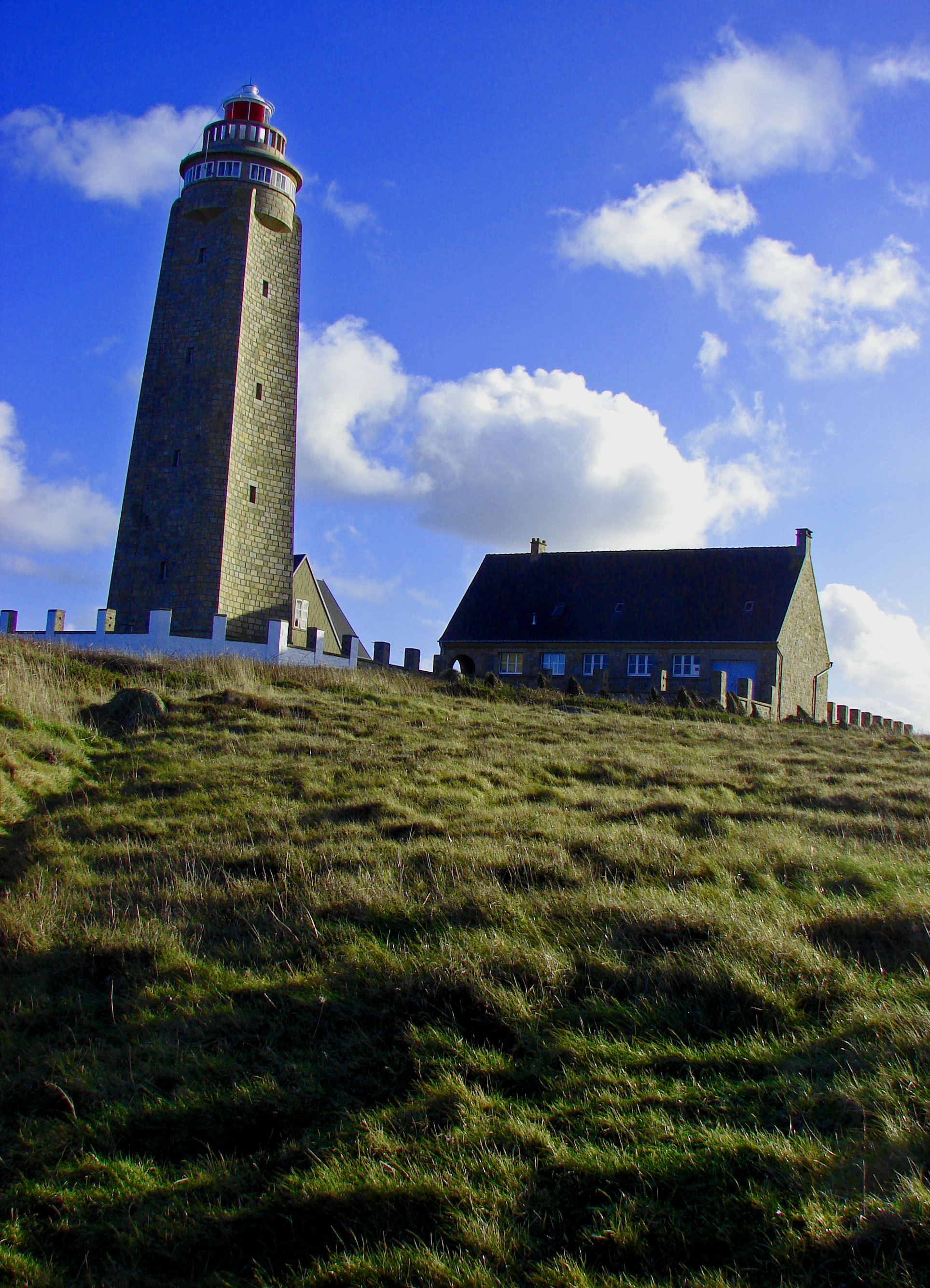 Phare de Fermanville - Manche - Normandie - France